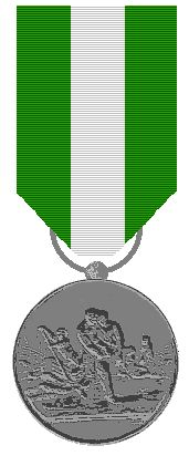 Medaille voor redders in zilver zoals die na 1898 werd verleend.